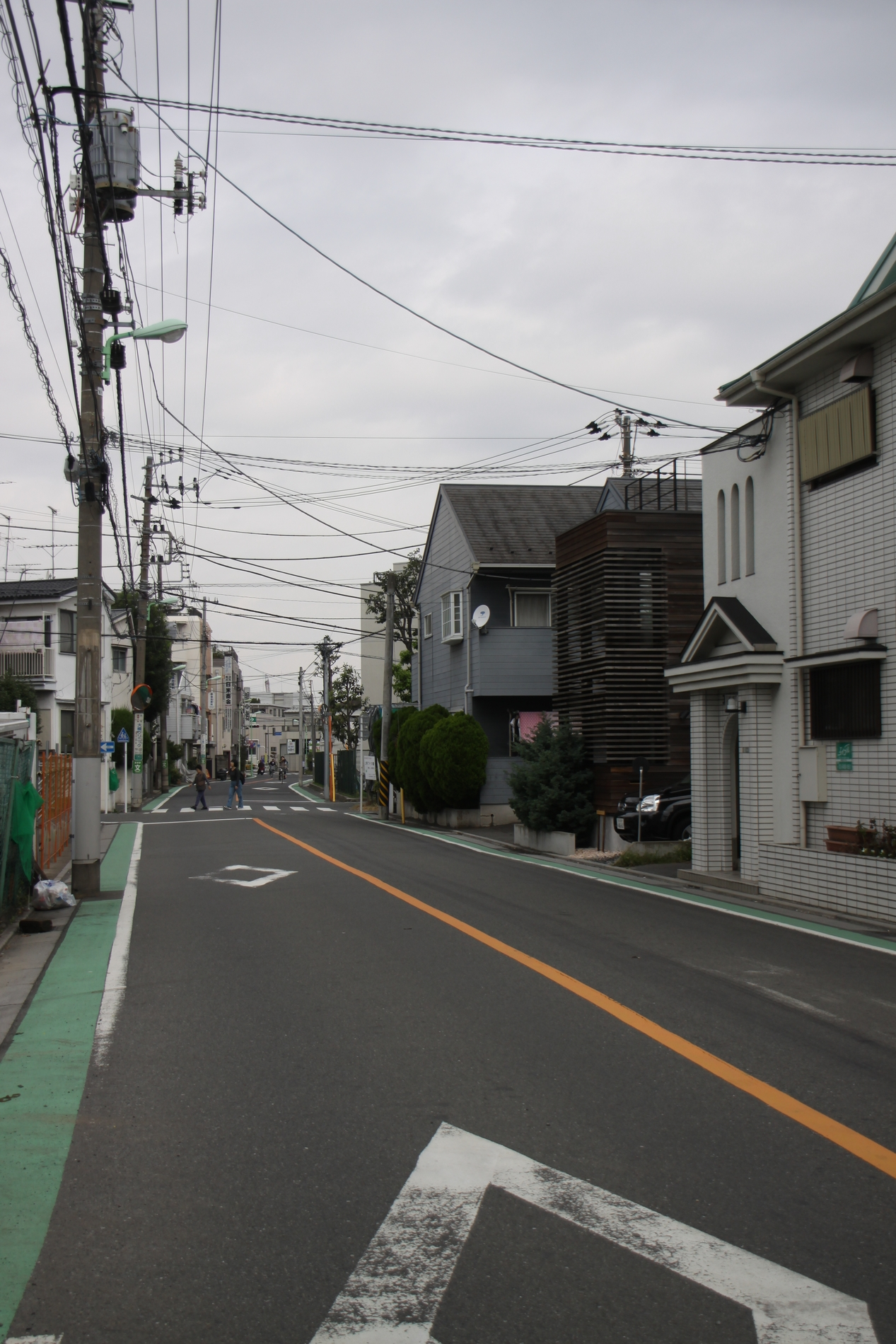 上北沢